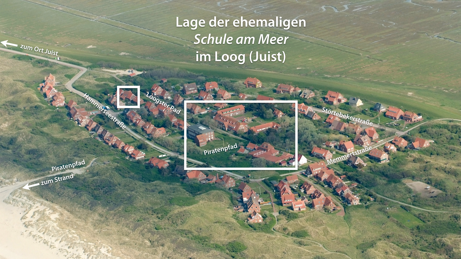 Der Ort Loog auf der Nordseeinsel Juist, Luftbildaufnahme vom 13. Mai 2012. Der Fotograf bzw. Betrachter blickt etwa in Richtung Südosten. Der weiße Rahmen in der Bildmitte fokussiert auf das frühere Gelände der reformpädagogischen Schule am Meer, 1925 gegründet von Martin Luserke (1880–1968). Die Schule wurde vor dem Hintergrund der nationalsozialistischen Gleichschaltung im Jahr 1934 geschlossen. Zur damaligen Zeit befanden sich im Loog nur vereinzelt Häuser und keine Bäume, die Schule hatte demzufolge viel freies Gelände um sich herum, um ihre elf Schulgärten anlegen zu können. Insofern täuscht die heute verdichtete Siedlung über die damaligen Verhältnisse hinweg. Die Schüler hatten über den sandigen Pfad durch die Dünen (heute Piratenpfad genannt), der direkt vor Haus Diesseits begann, direkten Zugang zum Strand und zum Meer. Dort brachten sie beispielsweise ihre Segelboote zu Wasser oder nutzten Pausen für ihre „Tobsucht“, das unreglementierte Herumtoben am Strand. Der zweite, kleinere weiße Rahmen umfasst Neufundland, ein damals privat neu errichtetes Insulanerhaus, das die Schule als Unterkunft für die jüngsten Schüler pachtete.